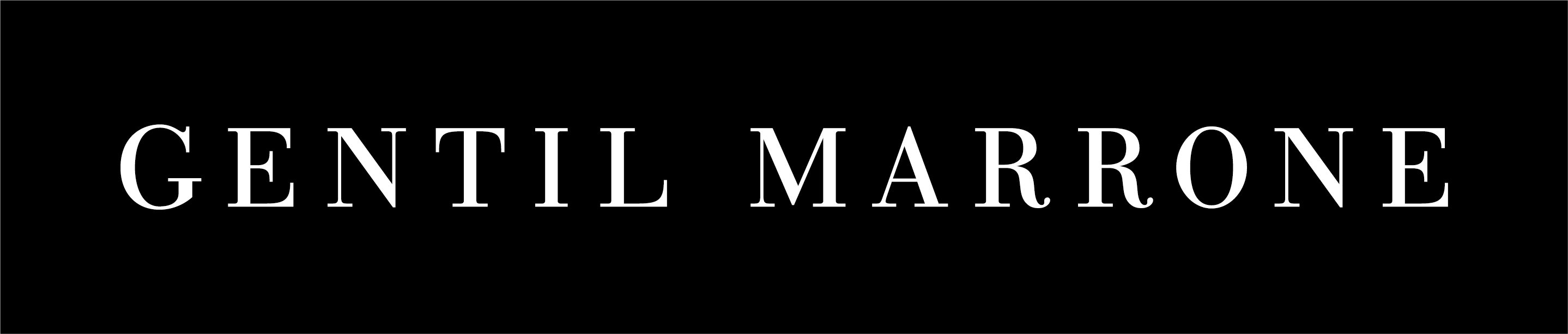 新ロゴ（2019年3月1日～）